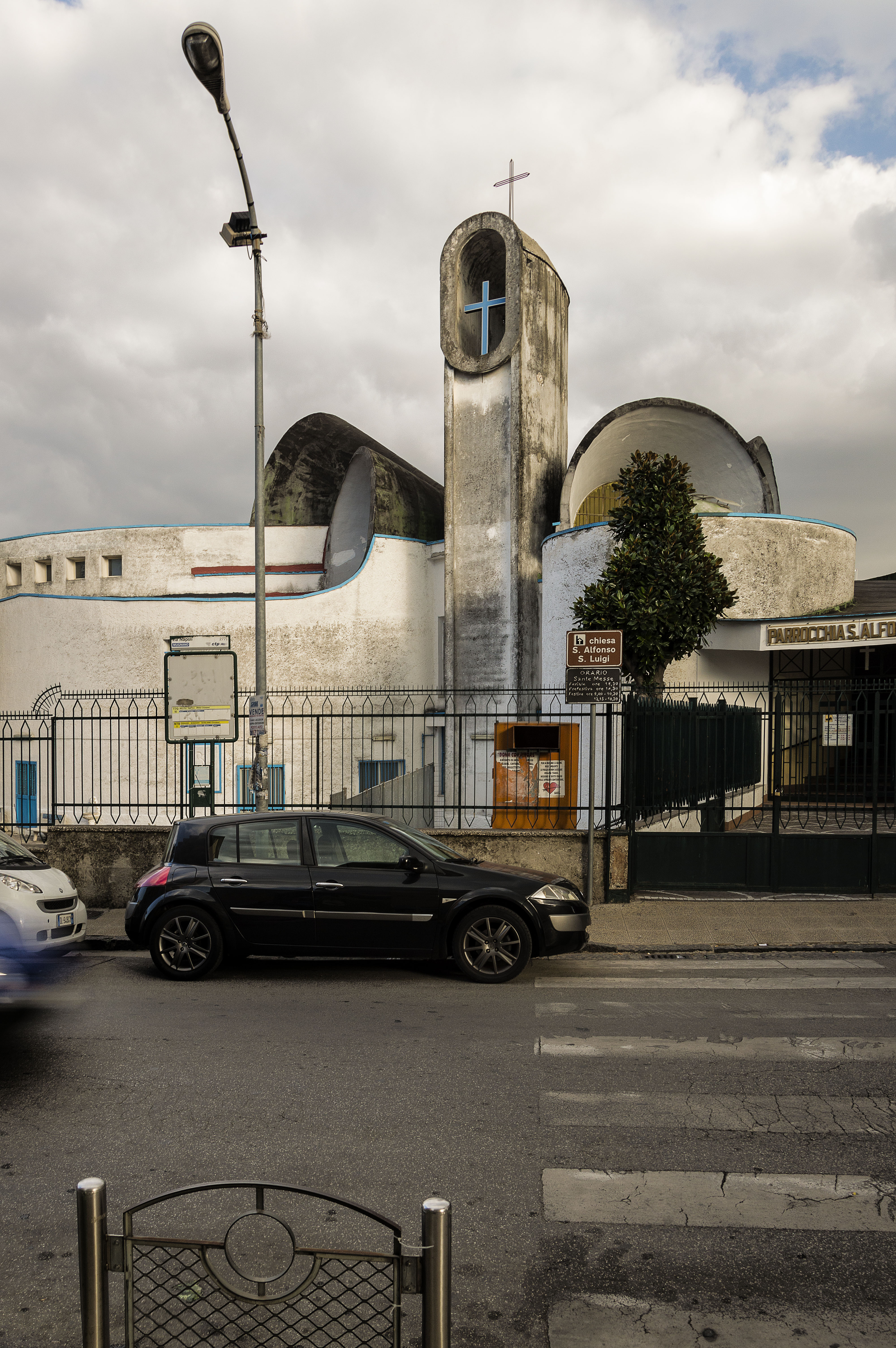 Complesso Parrocchiale in Via Napoli, Mugnano di Napoli.